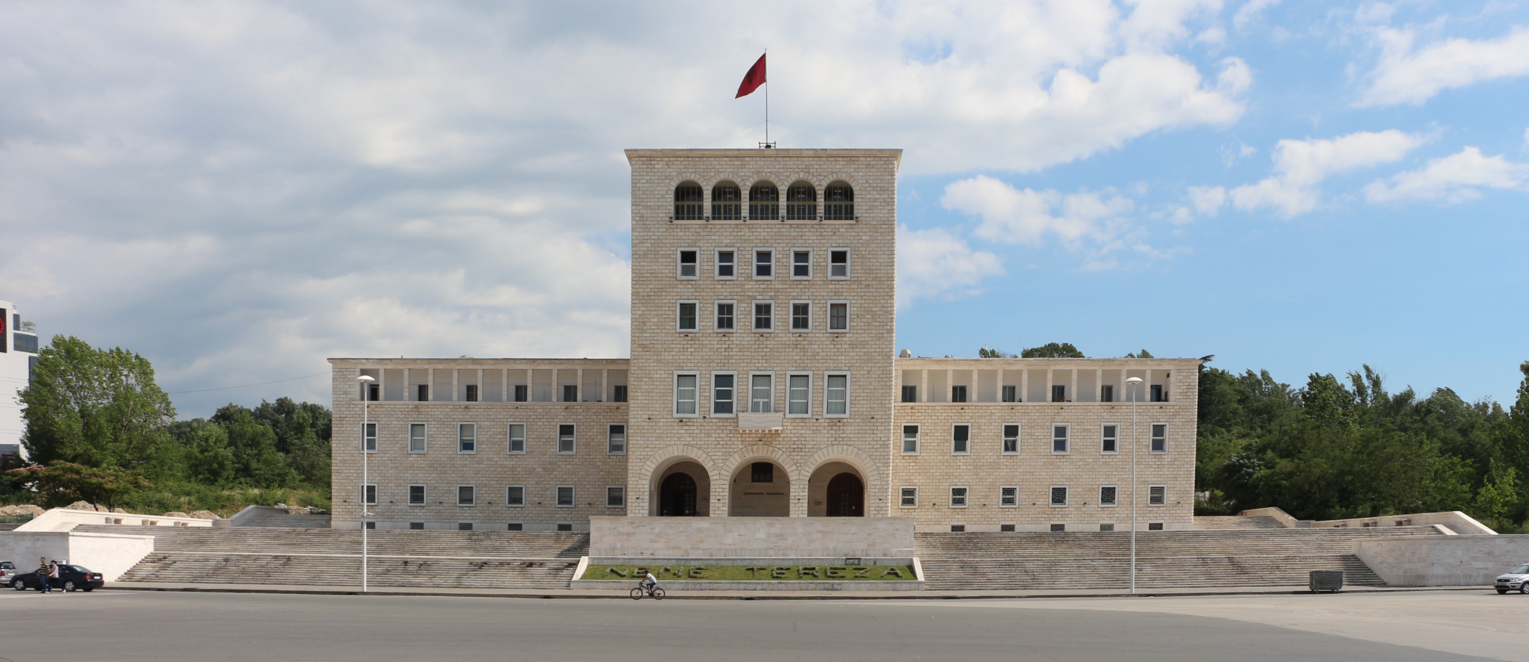 Universiteti I Tiranes